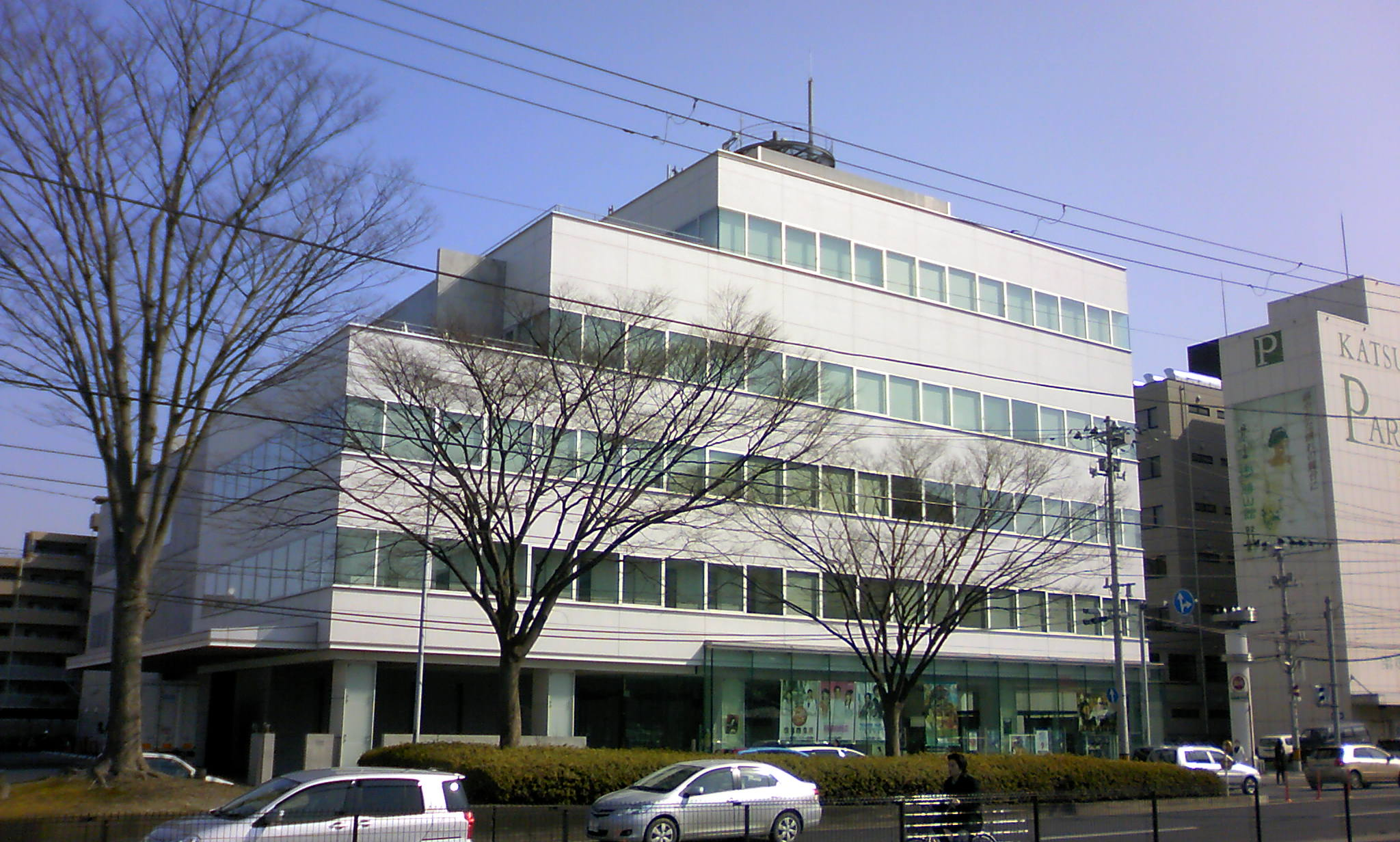 仙台放送社屋